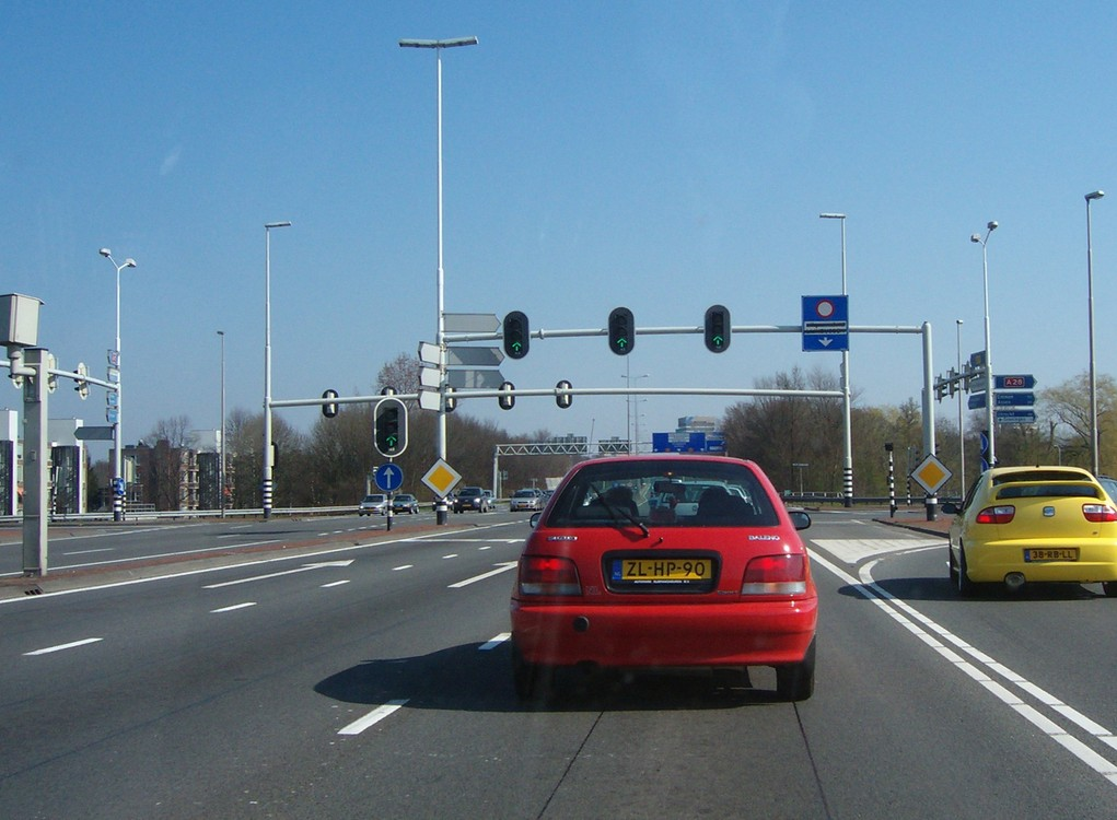 Julianaplein, Groningen